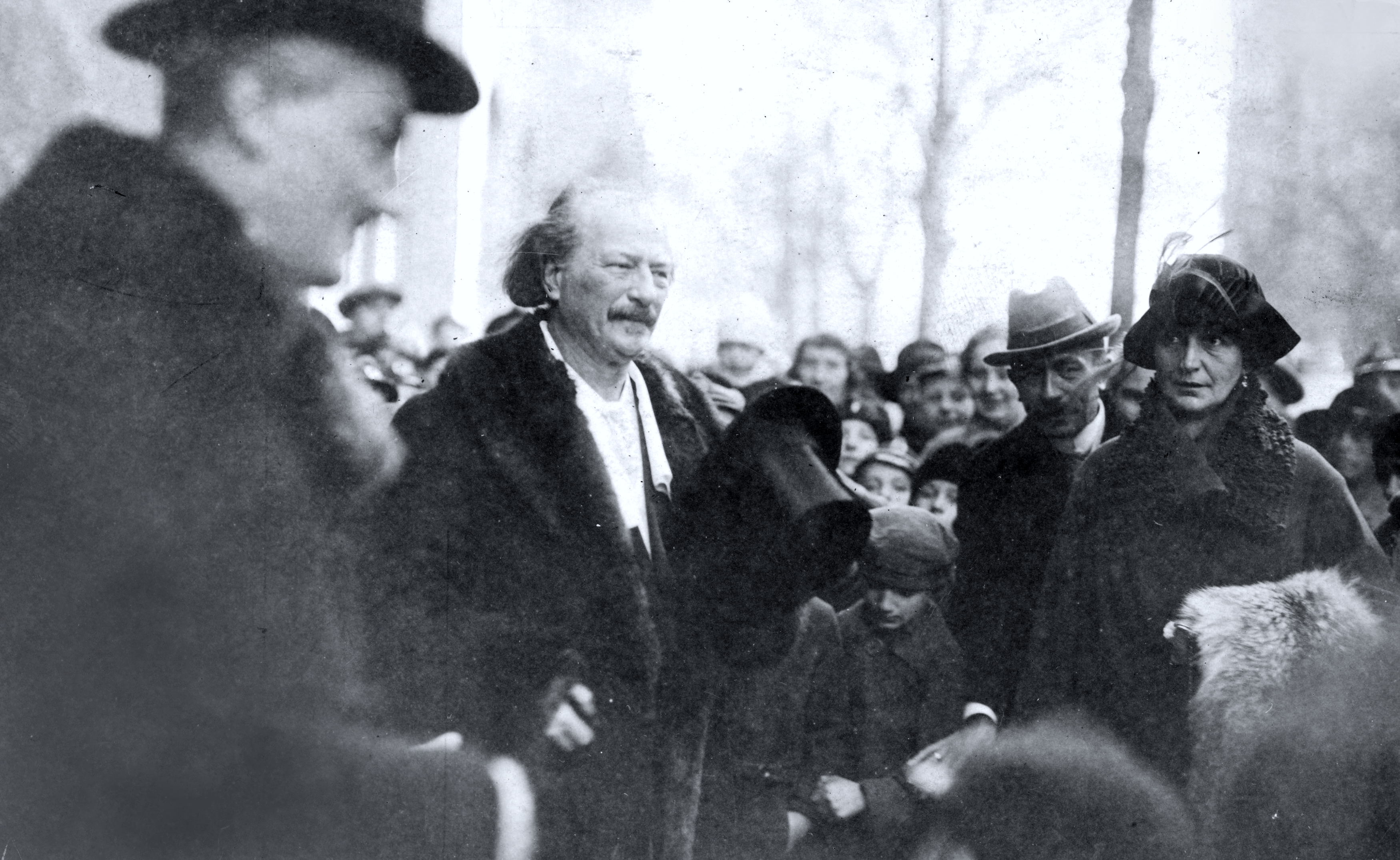 Ignacy Jan Paderewski wśród witających go osób.